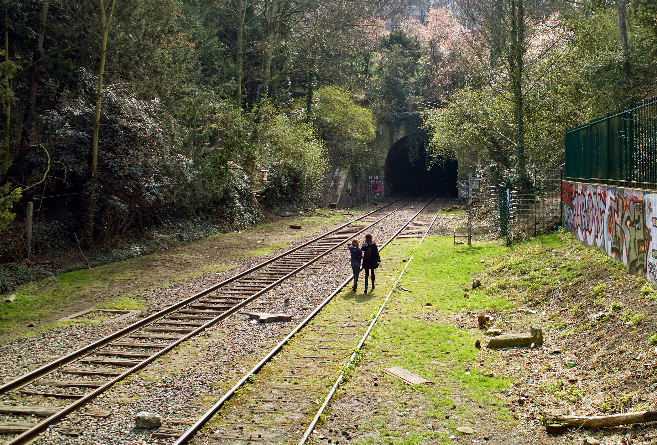 Ligne de Petite Ceinture, Parc des Buttes-Chaumont, Paris ,France